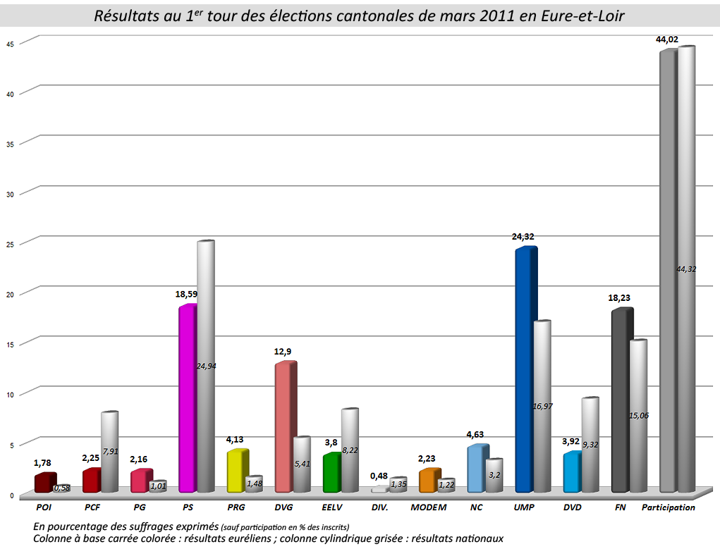 Graphique des résultats au 1er tour des Élections cantonales de 2011 en Eure-et-Loir